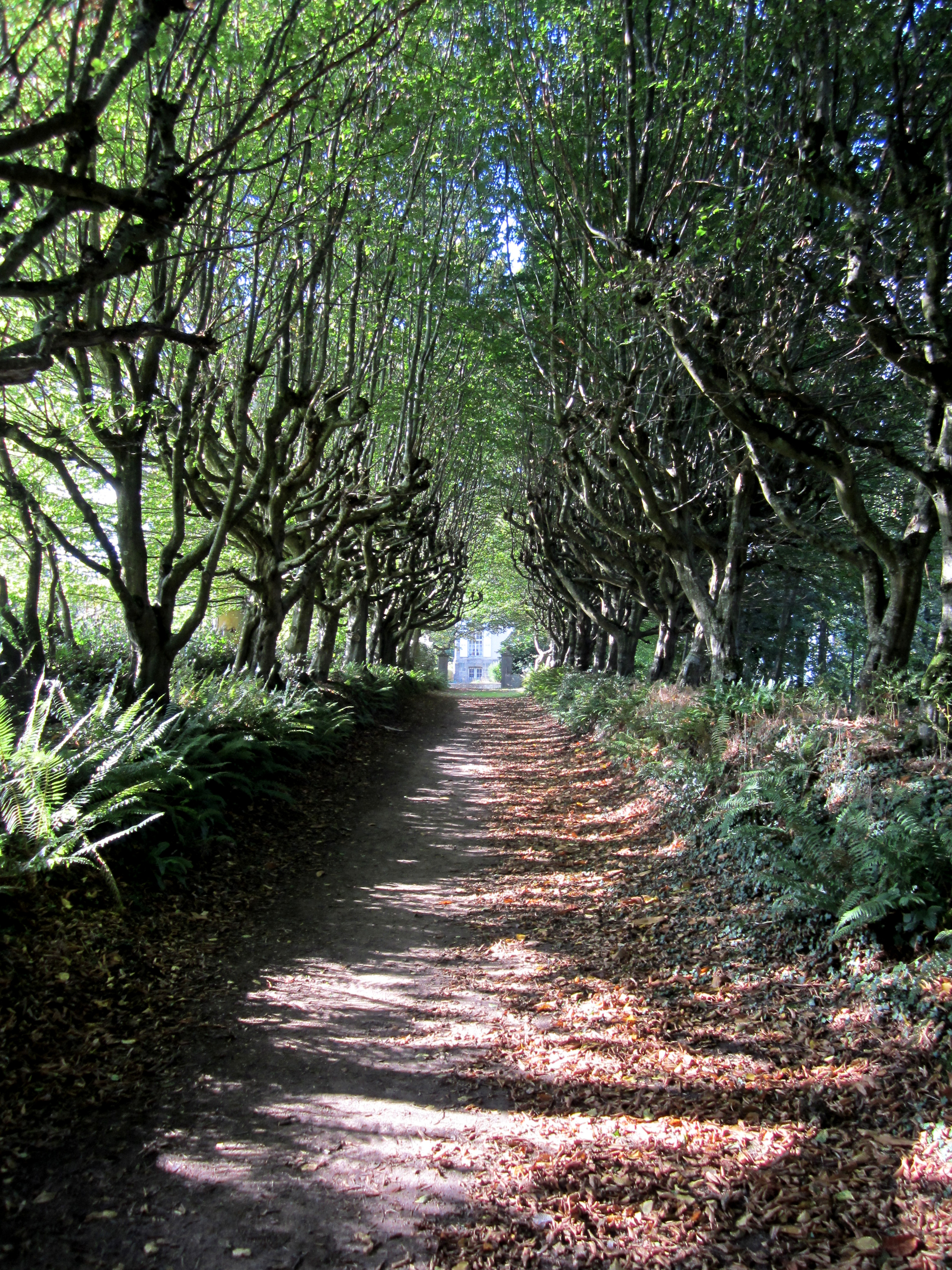 Château de Carneville, Manche En cours de classement (certains pieds datent de 1750) .